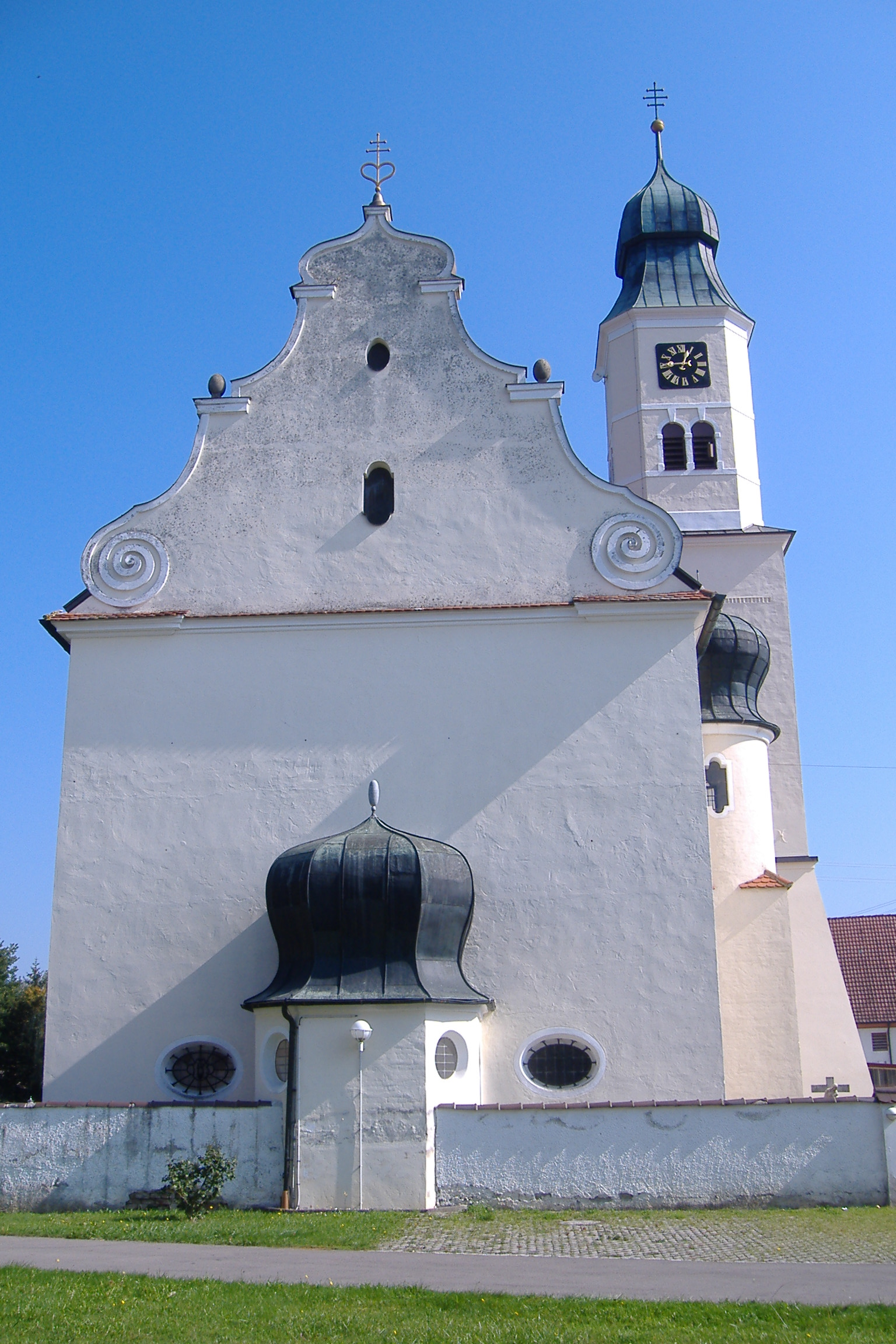 Fristingen